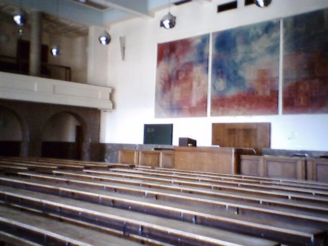 Colegium maximum. Faculty of Law in Prague - Právnická fakulta v Praze. Architekt: Jan Kotěra